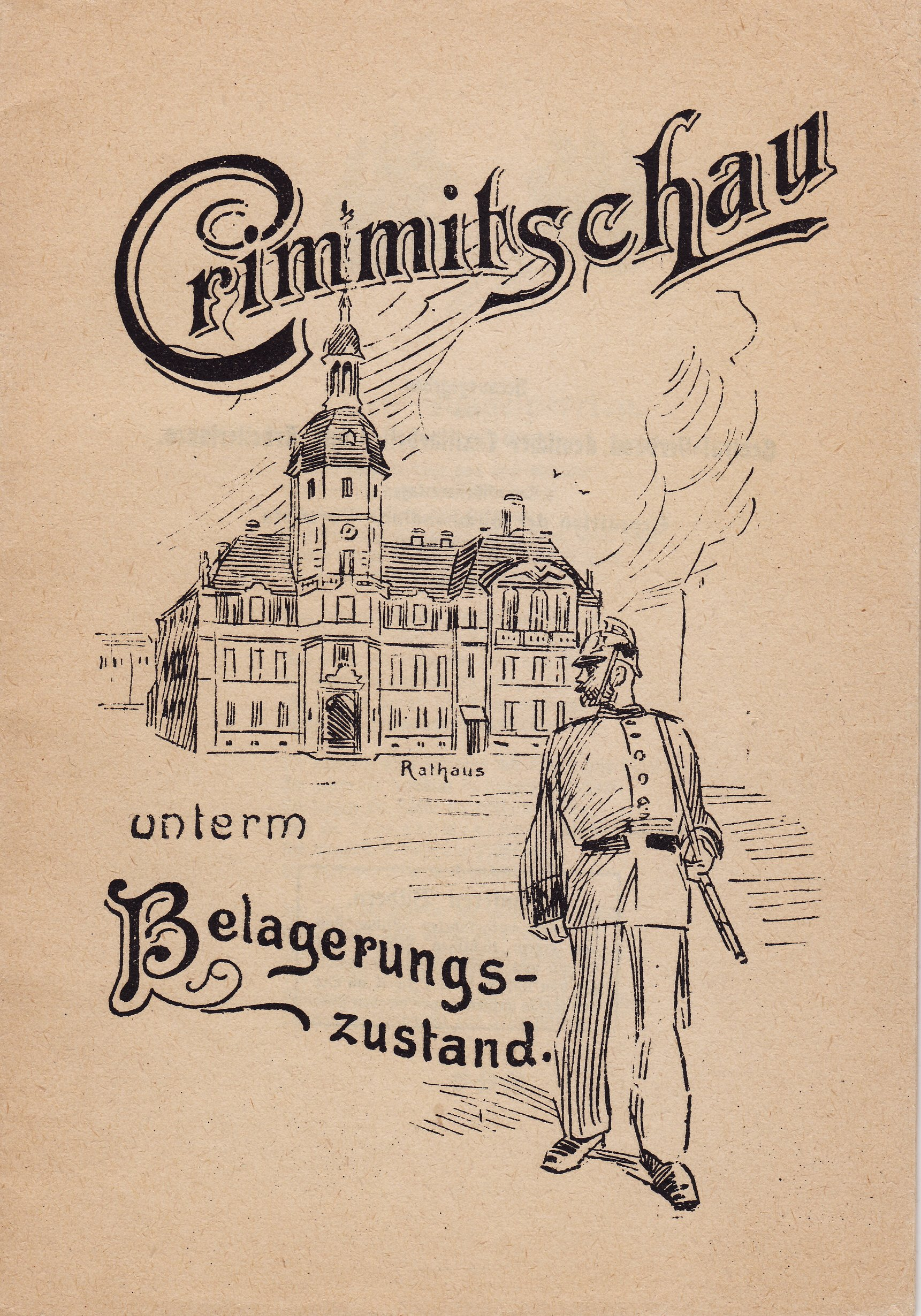 Buchtitel: Crimmitschau unterm Belagerungszustand